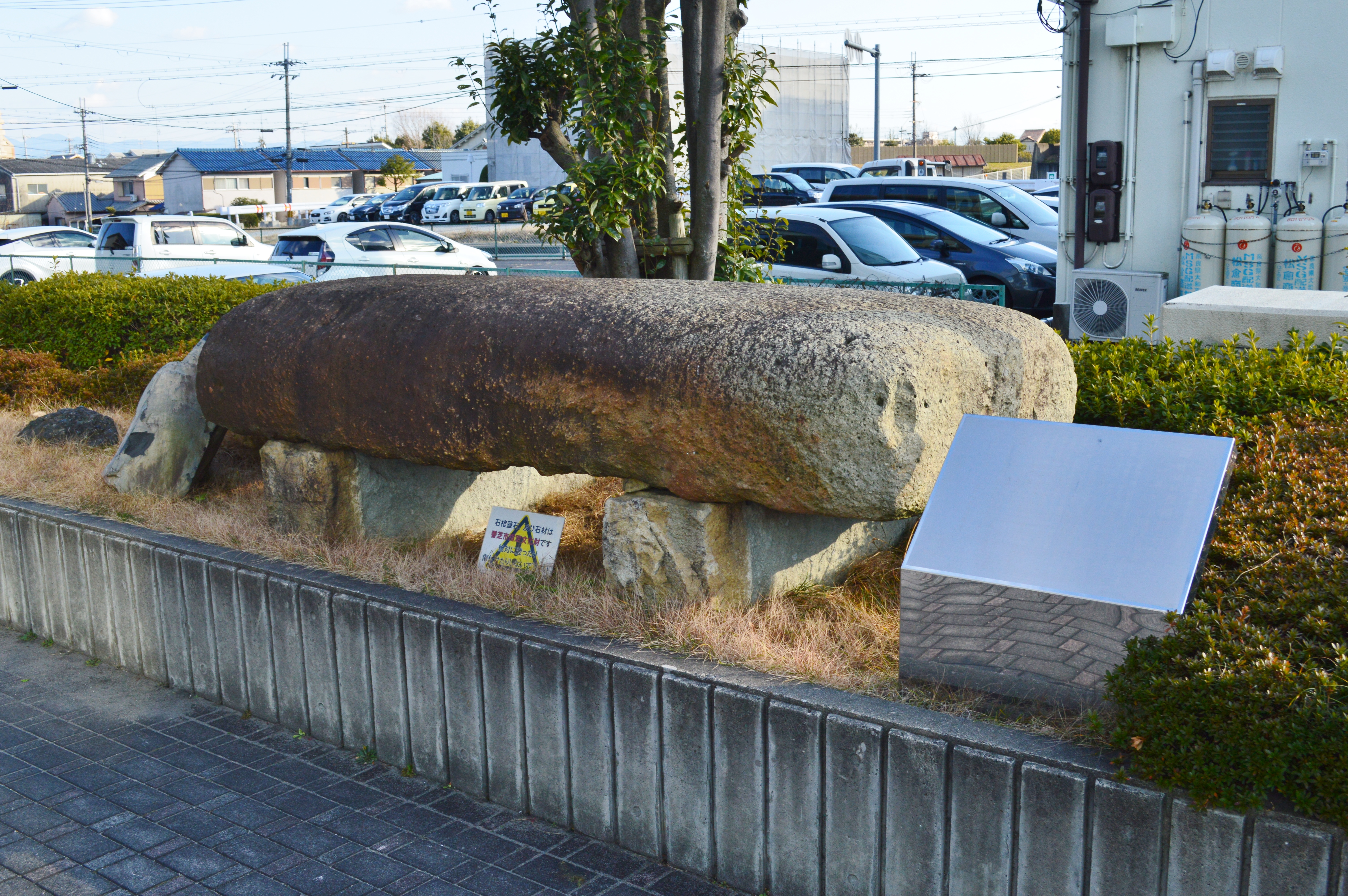 ふたかみ文化センター前所在 刳抜式長持形石棺蓋石